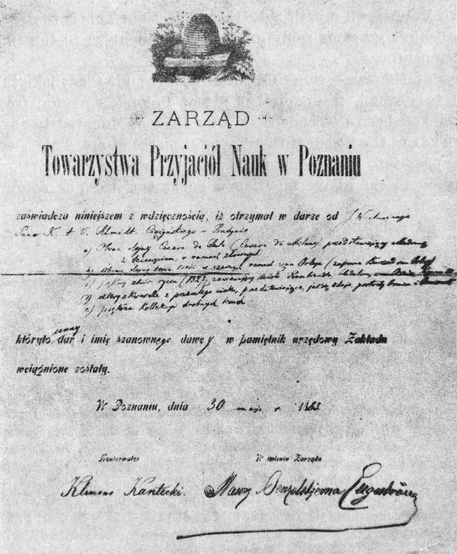 Potwierdzenie darowizny dokonanej przez Konstantego Schmidta-Ciążyńskiego na rzecz Poznańskiego Towarzystwa Przyjaciół Nauk.